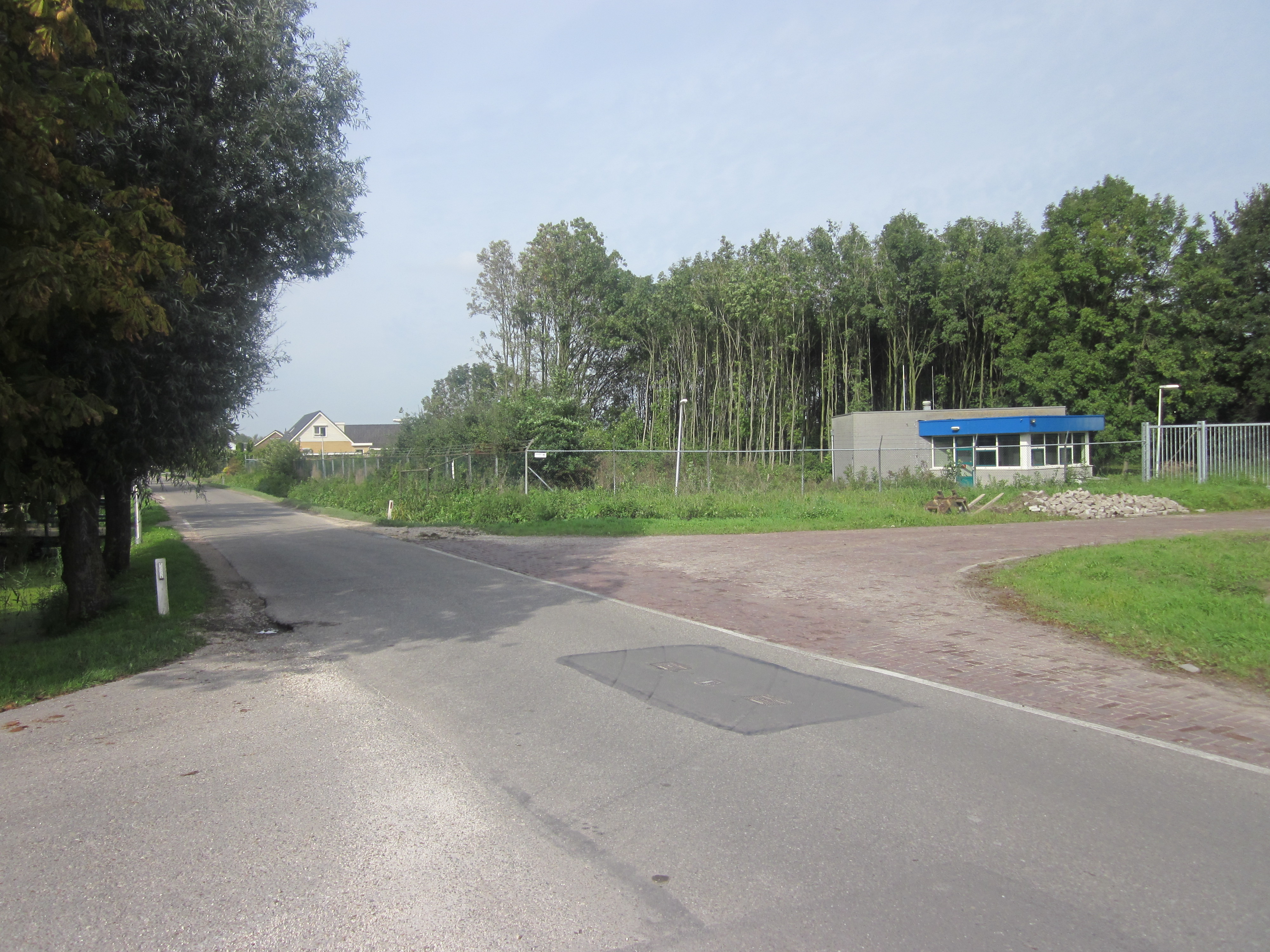 Plaats waar het schefferkamp in De Lier, Nederland heeft gestaan. Momenteel (2010) wordt het nog gebruikt door Defensie.